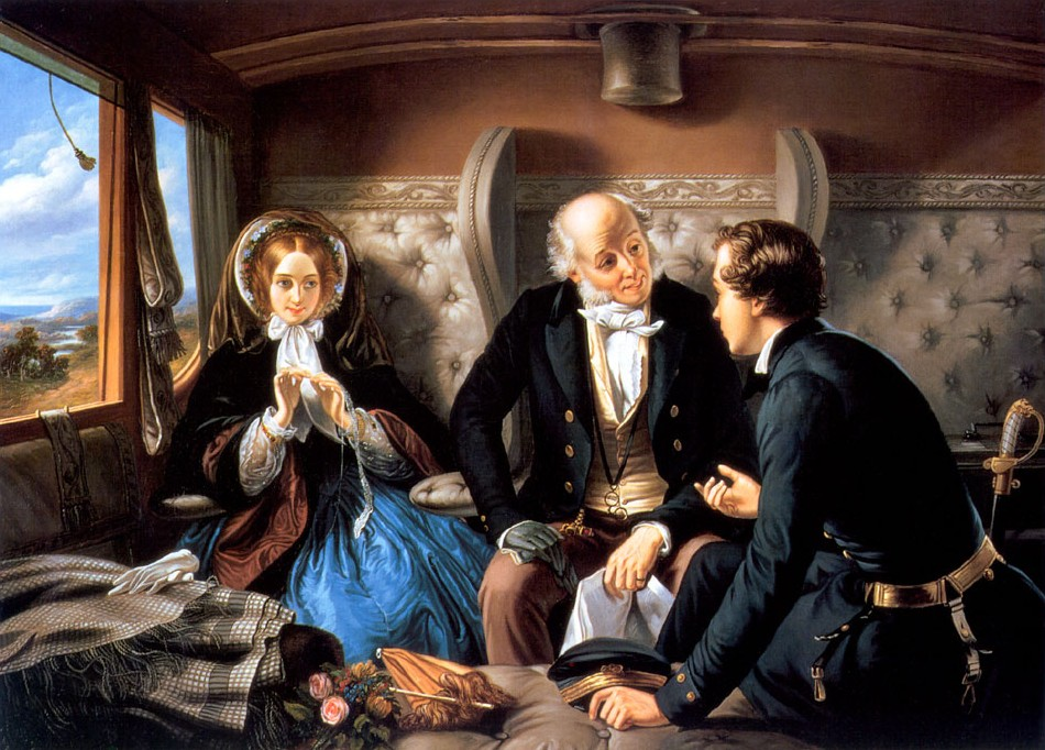 Tweede herziene versie van (Travelling) First Class - The Meeting. De eerste versie werd als controversieel beschouwd omdat de jongeman met de jongedame praatte terwijl de oudere man was ingedommeld. Schilder (Abraham Solomon) overleed in 1862 Revised version of (Travelling) First Class - The Meeting. The original version was (in the Victorian era) considered as too controversial